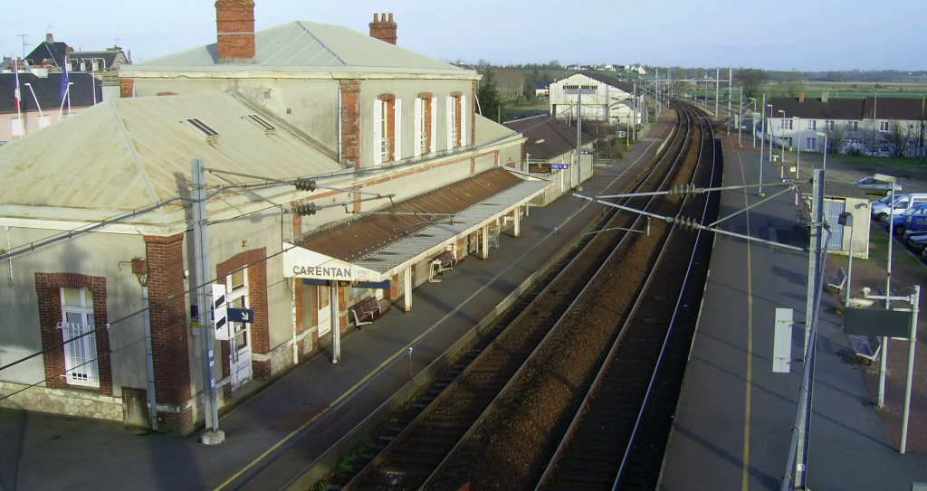 Gare de Carentan, vue depuis la passerelle